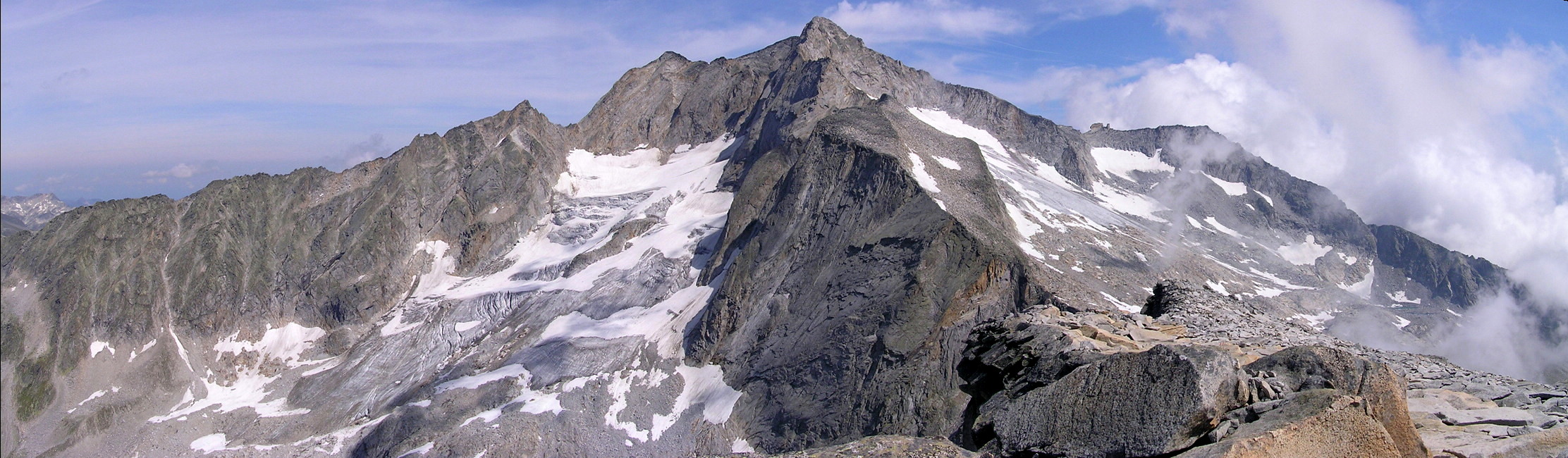 Die Hochalmspitze von Südwesten, von der Schneewinkelspitze aus gesehen